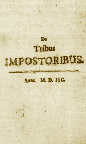 Prima edizione de "De tribus impostoribus", Wien, Straub, 1753, con la falsa data del 1598